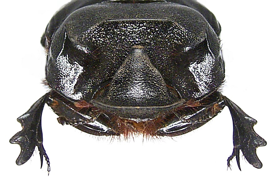 Familie: Scarabaeidae Grösse: 38-67 mm Verbreitung: Westafrika, Ostafrika, Zentralafrika Fundort: Zaire, Beni leg. R.Ducarme, 1983; det. U.Schmidt Foto: U.Schmidt, 2006